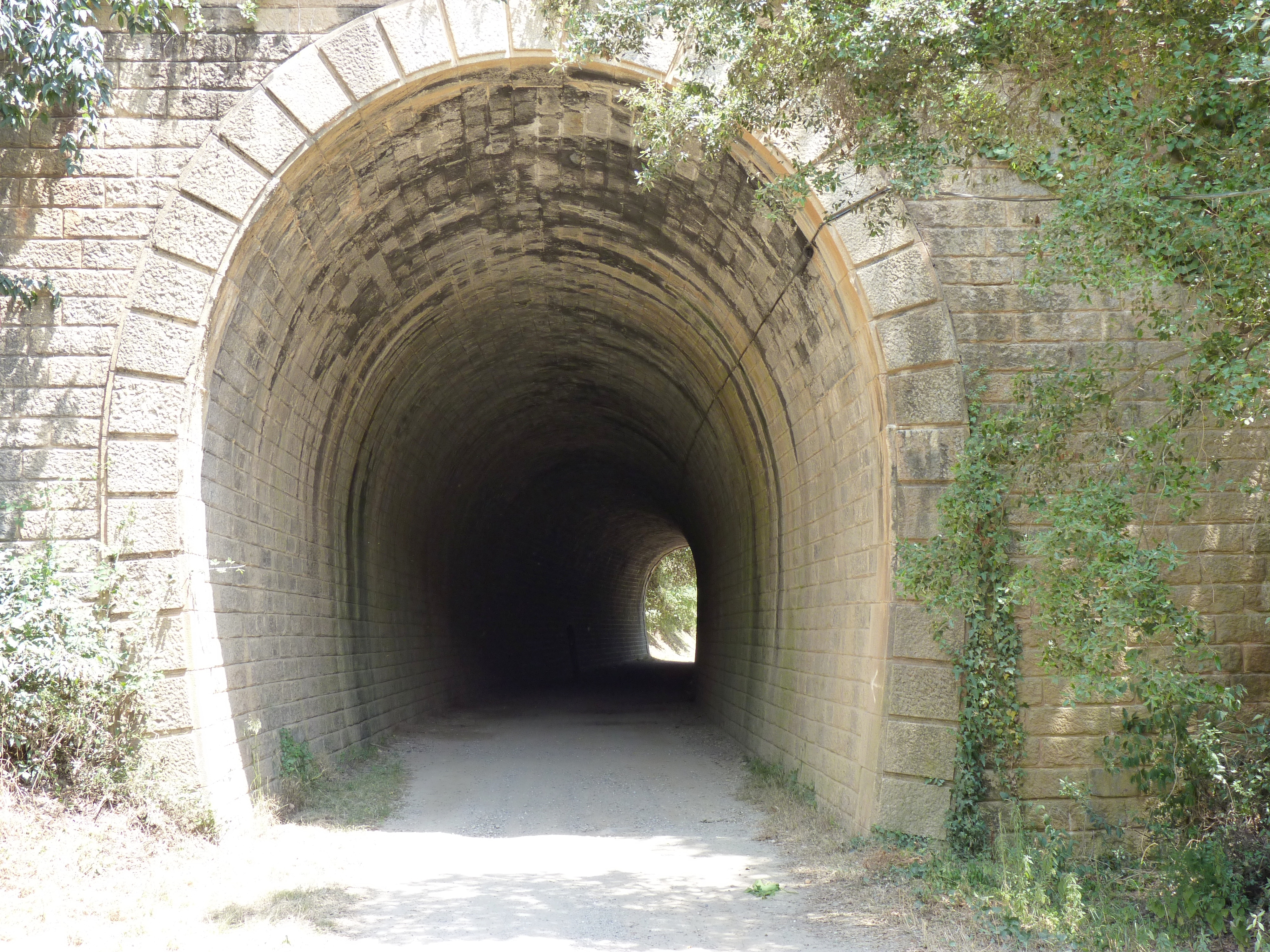 L'entrée de l'ancien tunnel de chemin de fer, Le Vila, Reynès (Pyrénées-Orientales, Languedoc-Roussillon, France)